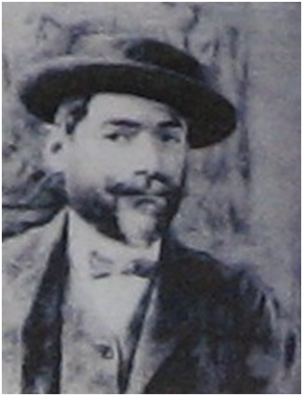 Fotoritratto giovanile di Michele tripisciano